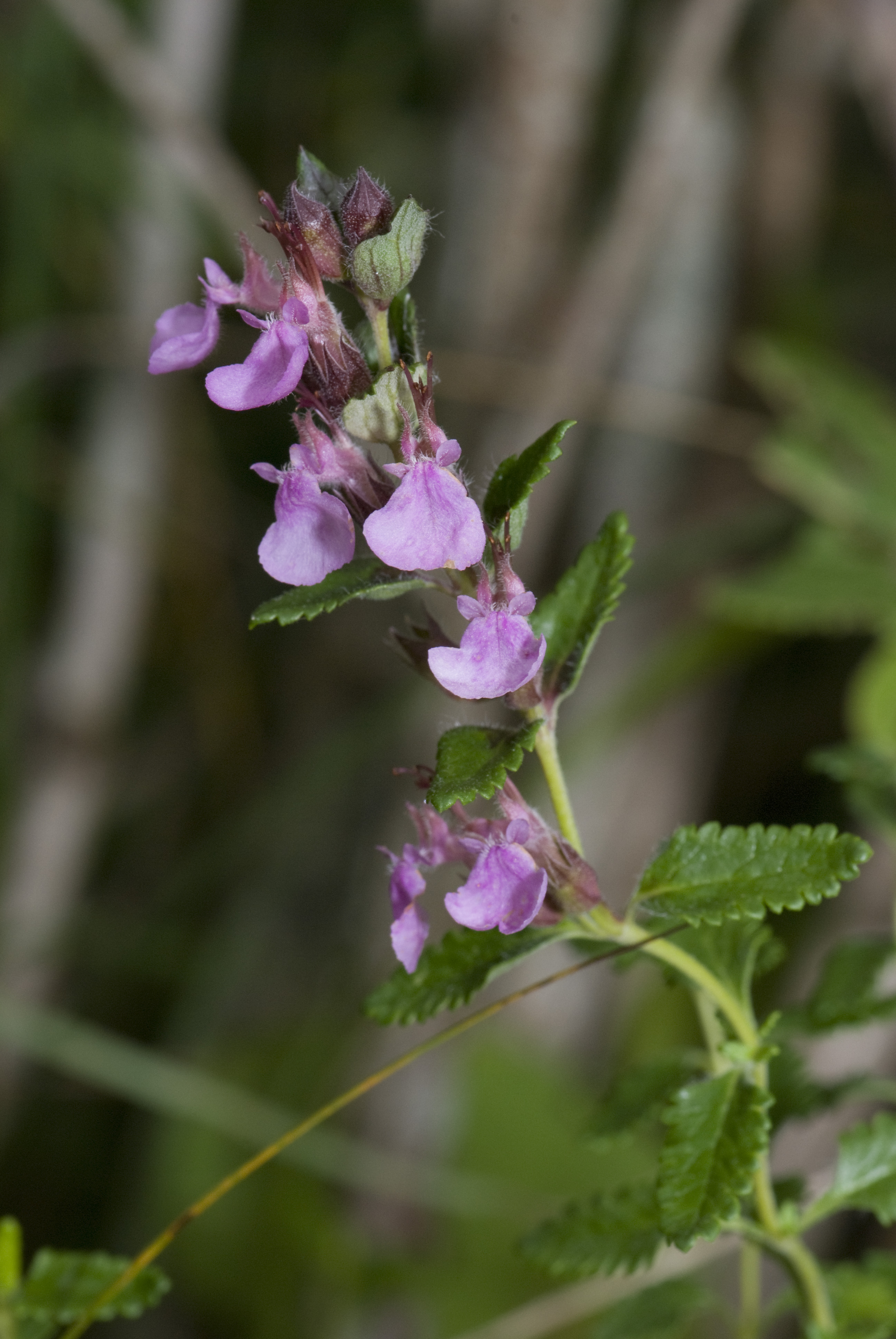 Teucrium chamaedrys-subsp-germanica Coteau de Chartèves (Aisne), France